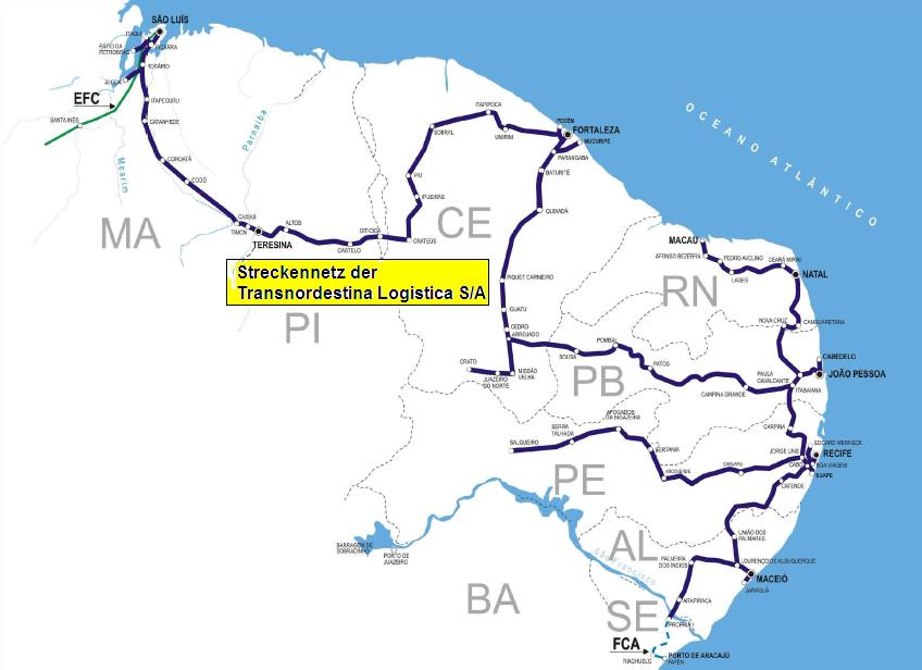 Streckennetz der Transnordestina Logistica SA, Brasilien 2010